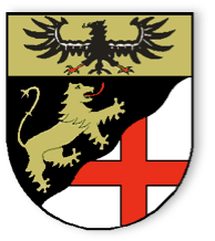 Wappen von Kisselbach